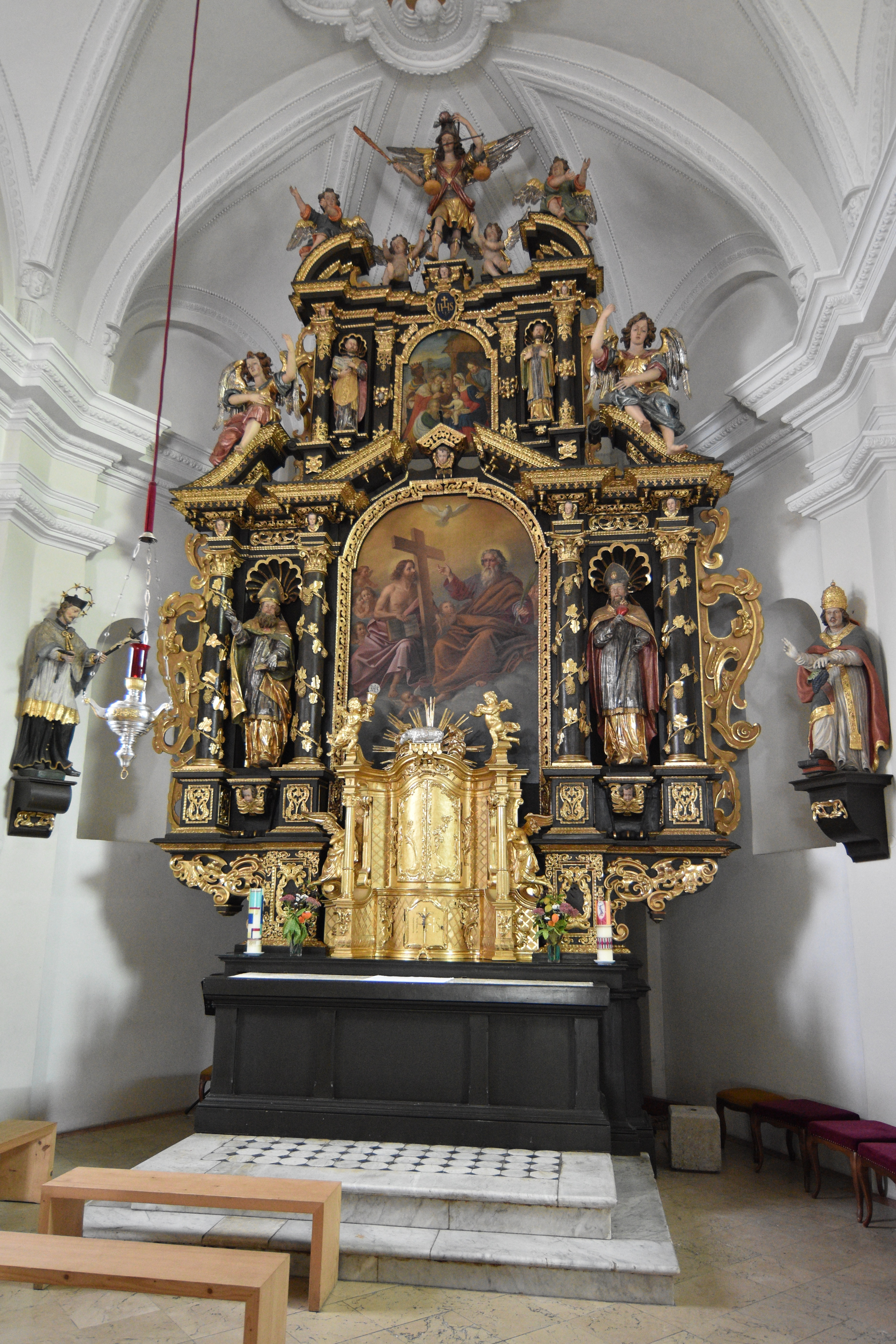 Heilige Dreifaltigkeit, Hausmannstätten Interior